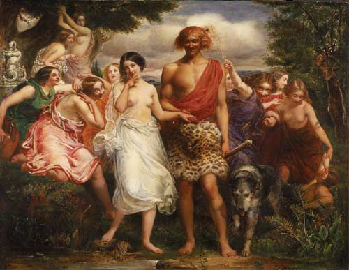 Cymon and Iphigenia